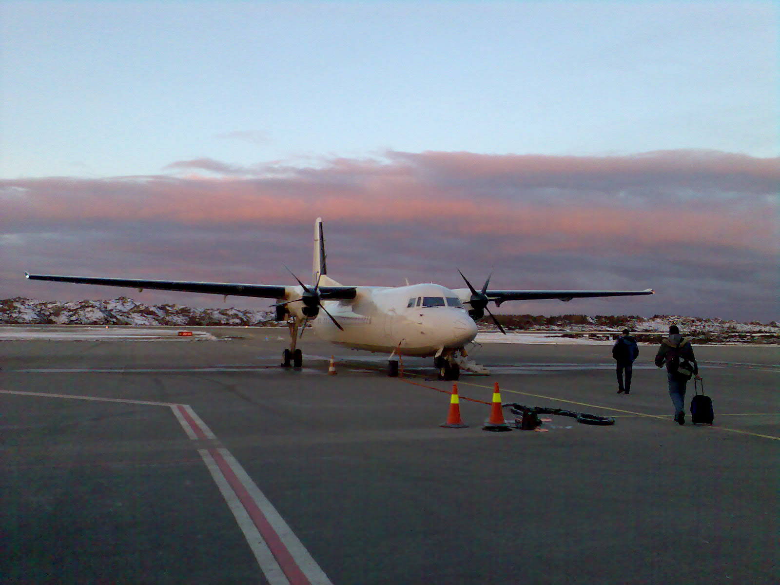 Fokker 50 at Haugesund Airport, Karmøy